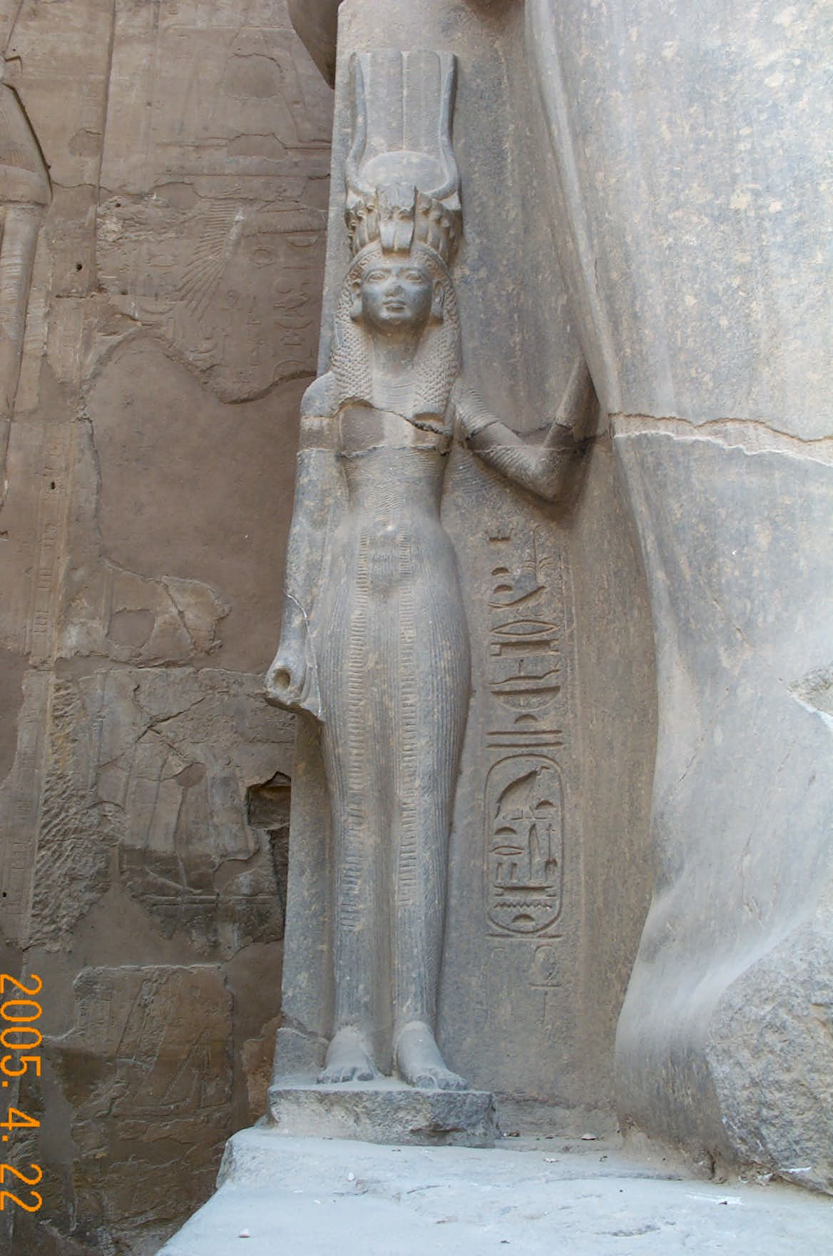 Nefertari királynő a luxori kolosszus lábánál (Egyiptom)